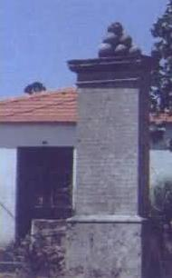 "As Bolas"